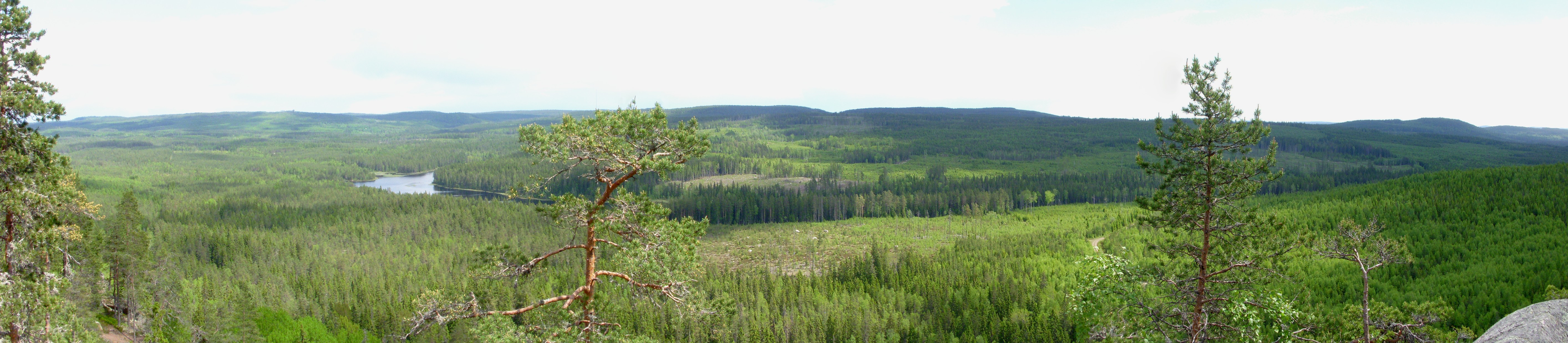 Naturreservatet "Tansvägga" i Dalarna, utsikt från "Predikstolen" mot öst